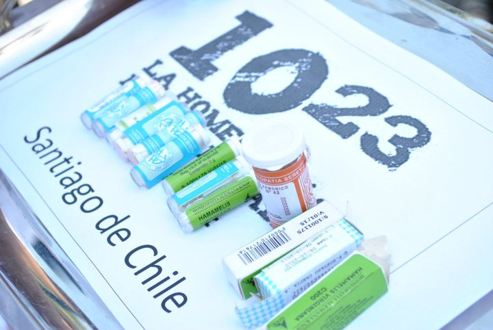 Suicidio homeopático de febrero de 2011 en Santiago de Chile. Bandeja que muestra los productos usados en el suicidio.